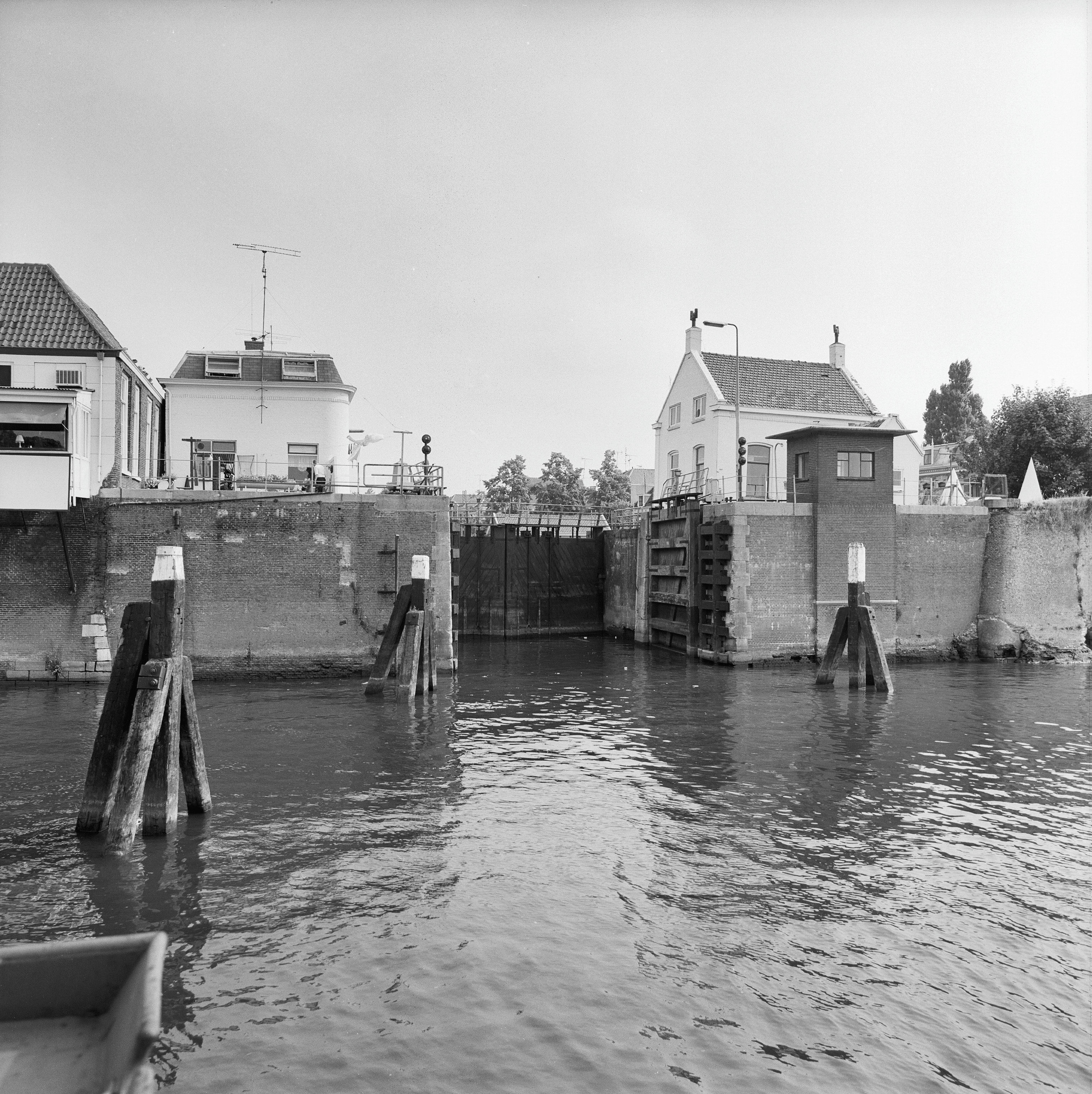 Sluizen: overzicht oude Merwedesluis